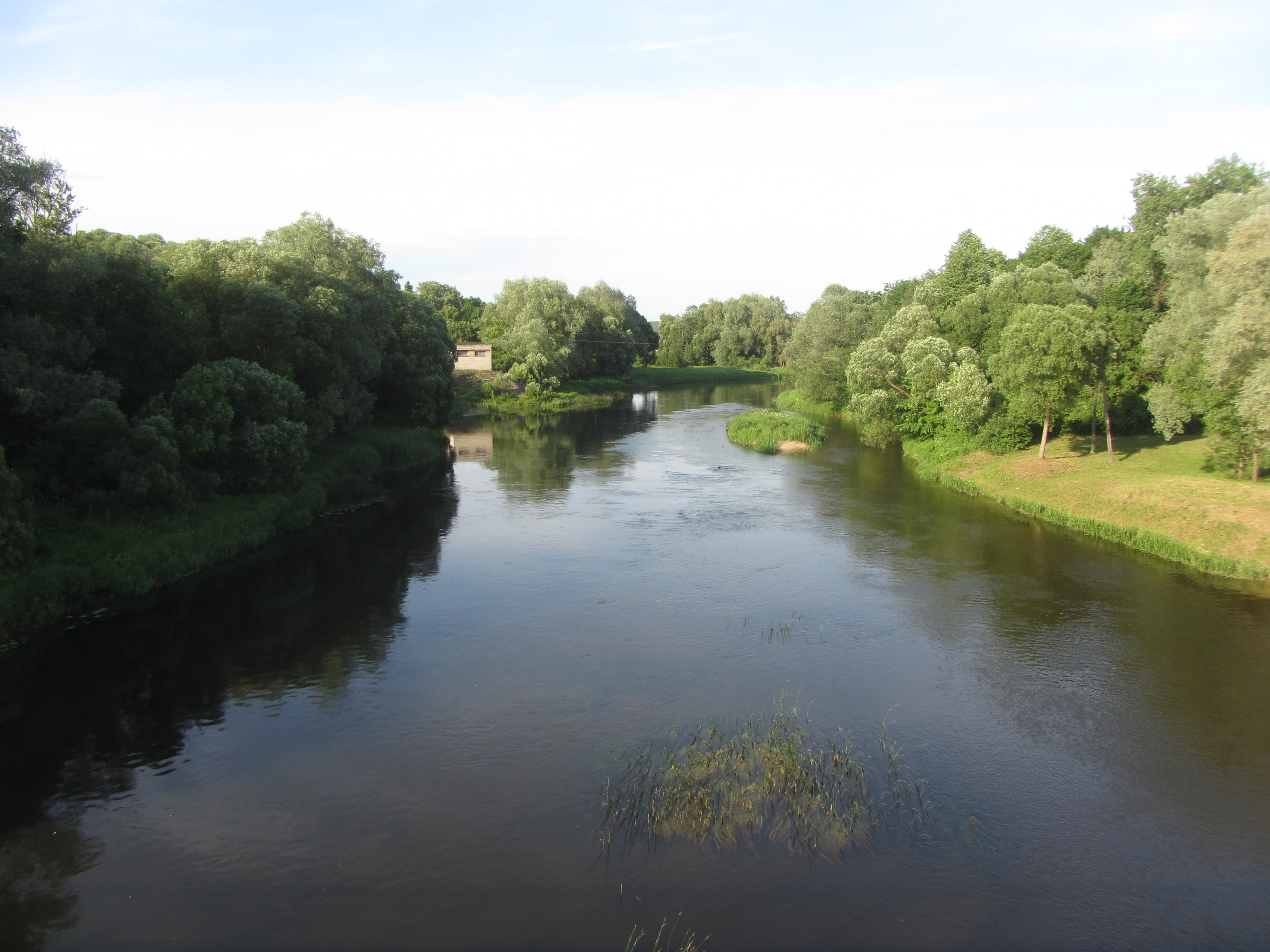 Upninkų sen., Lithuania